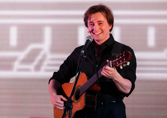 Сергей Безруков читает стихи Есенина и Высоцкого в Национальном центре управления обороной РФ